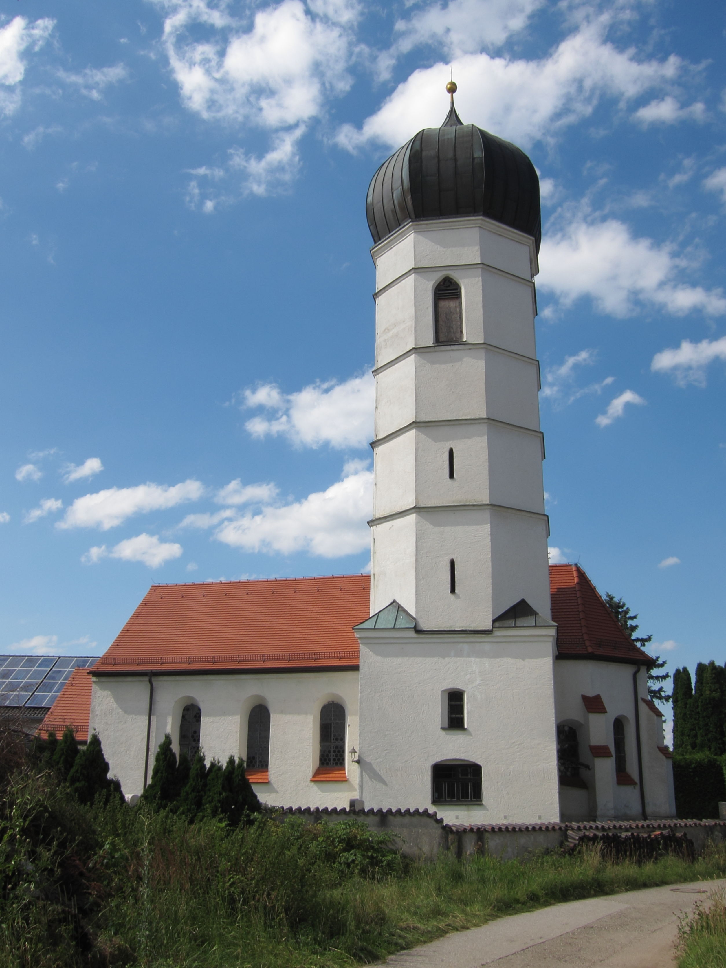 Weißenfeld, Feldkirchener Straße 13; katholische Filialkirche St. Bartholomäus, Langhaus im Kern romanisch, Chor gotisch, die Anlage um 1720 barockisiert; mit Ausstattung.